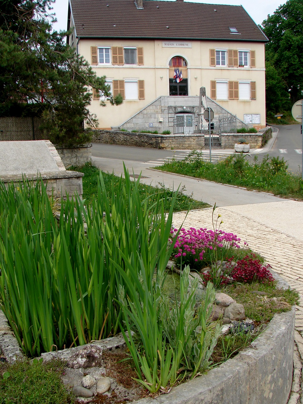 Vue de la fontaine avec la mairie de Pouilley-Français (Doubs, France) en arrière plan.